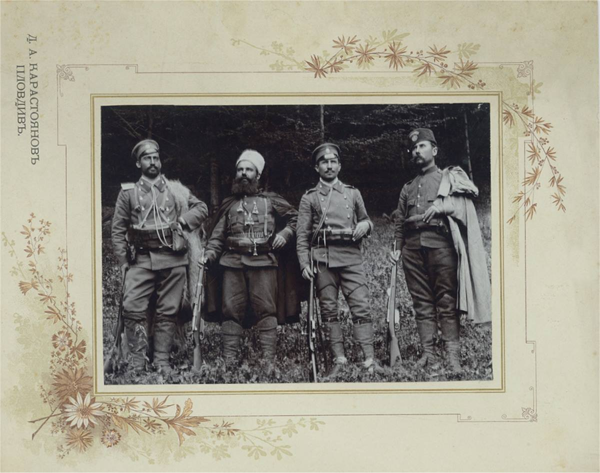 Войводите на Беласишкия отряд на Върховния комитет Петър Дървингов, Дончо Златков, Димитър Зографов и Кочо Аврамов по време на Илинденско-Преображенското въстание.